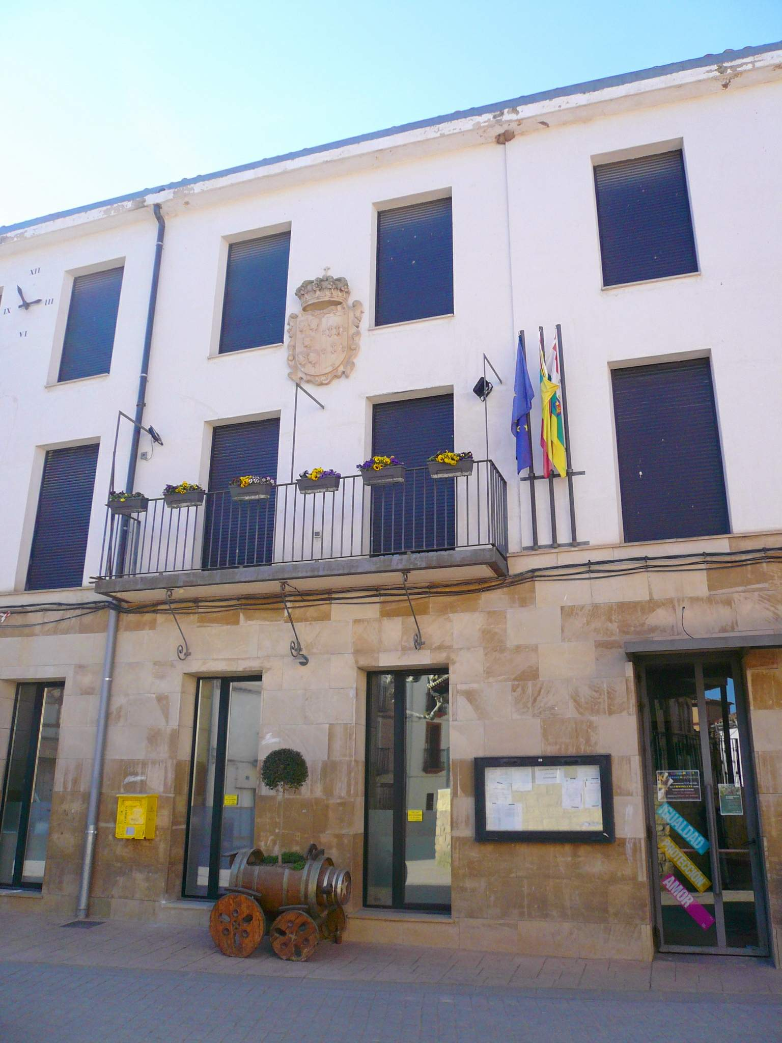 Ayuntamiento de Alcanadre (La Rioja)